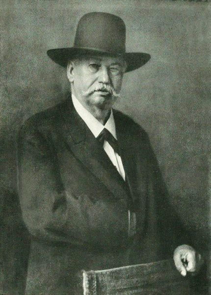 Willmar Schwabe um 1910